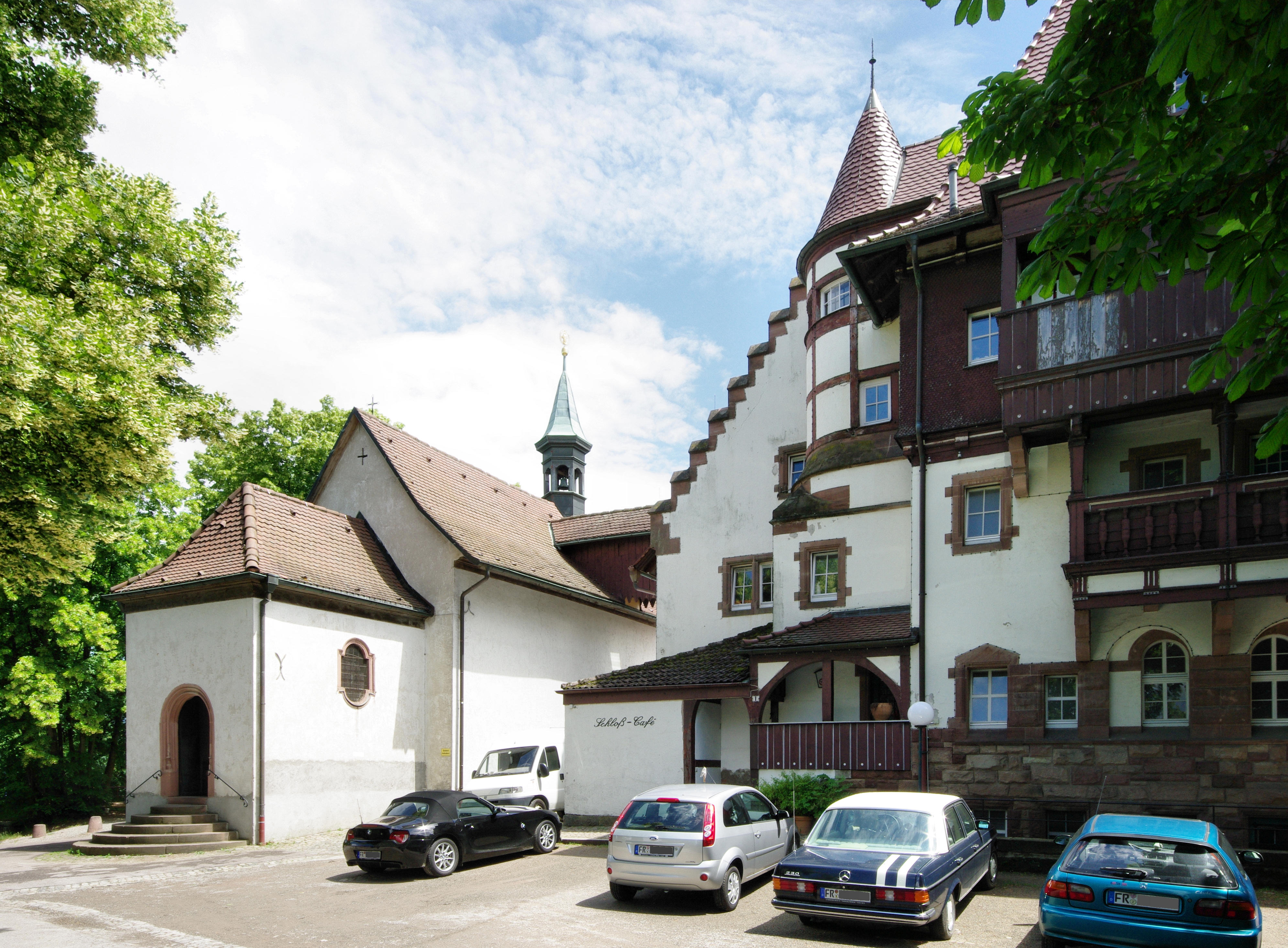 Schloß-Cafe und Kapellen. Man sieht hier den Verbindungsgang auf Dachhöhe